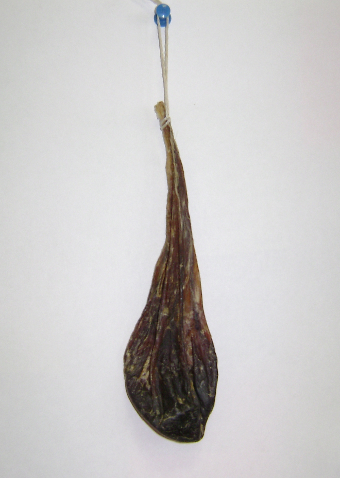 Медвежья желчь пузырная